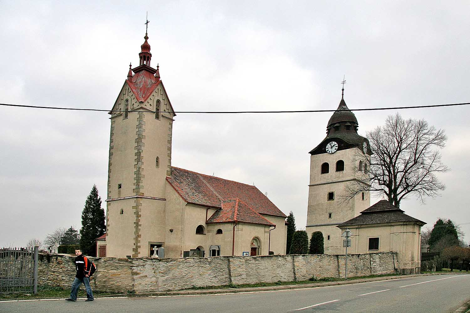 kostel_Svatého_Mikuláše v Bohuslavicích, district Náchod autor: Prazak date: 1. 12. 2006